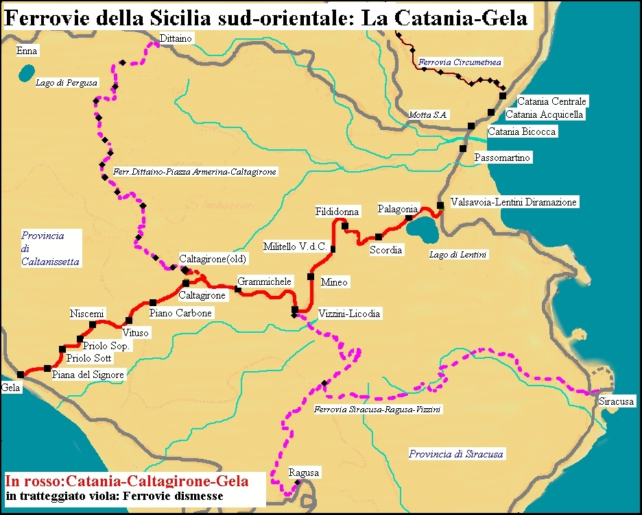 Mappa di ferrovia Catania-Gela